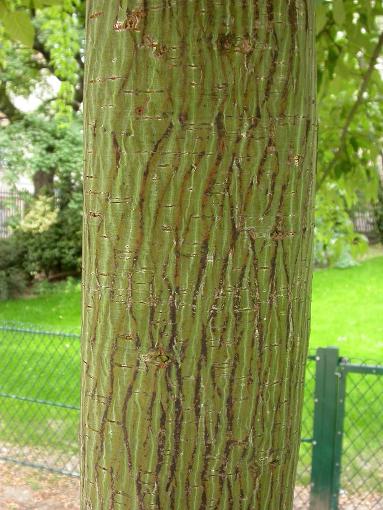 écorce d'Acer davidii